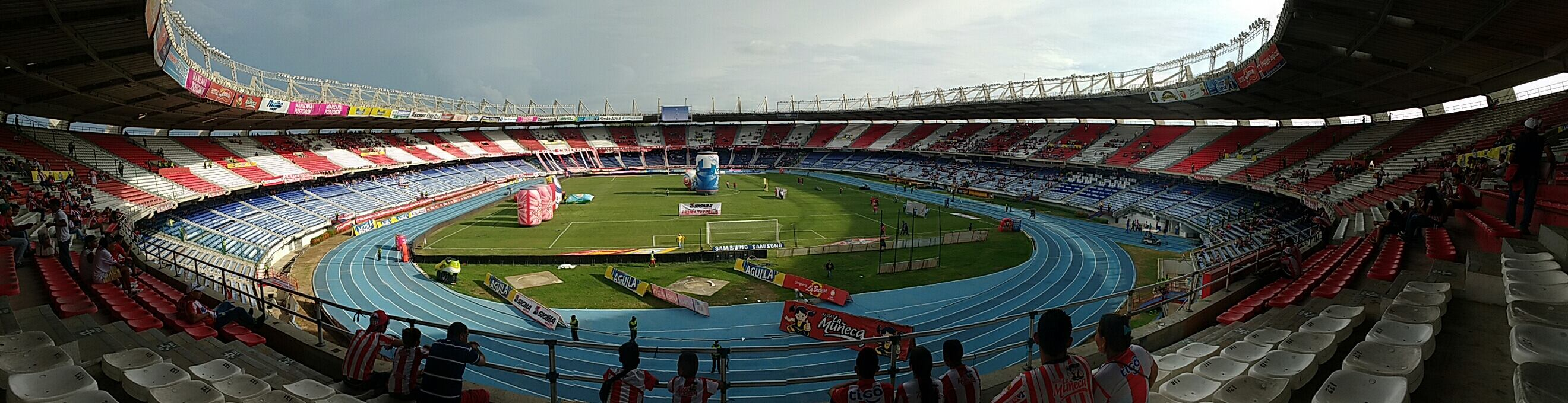 Panoramica Estadio Metropolitano Roberto Meléndez